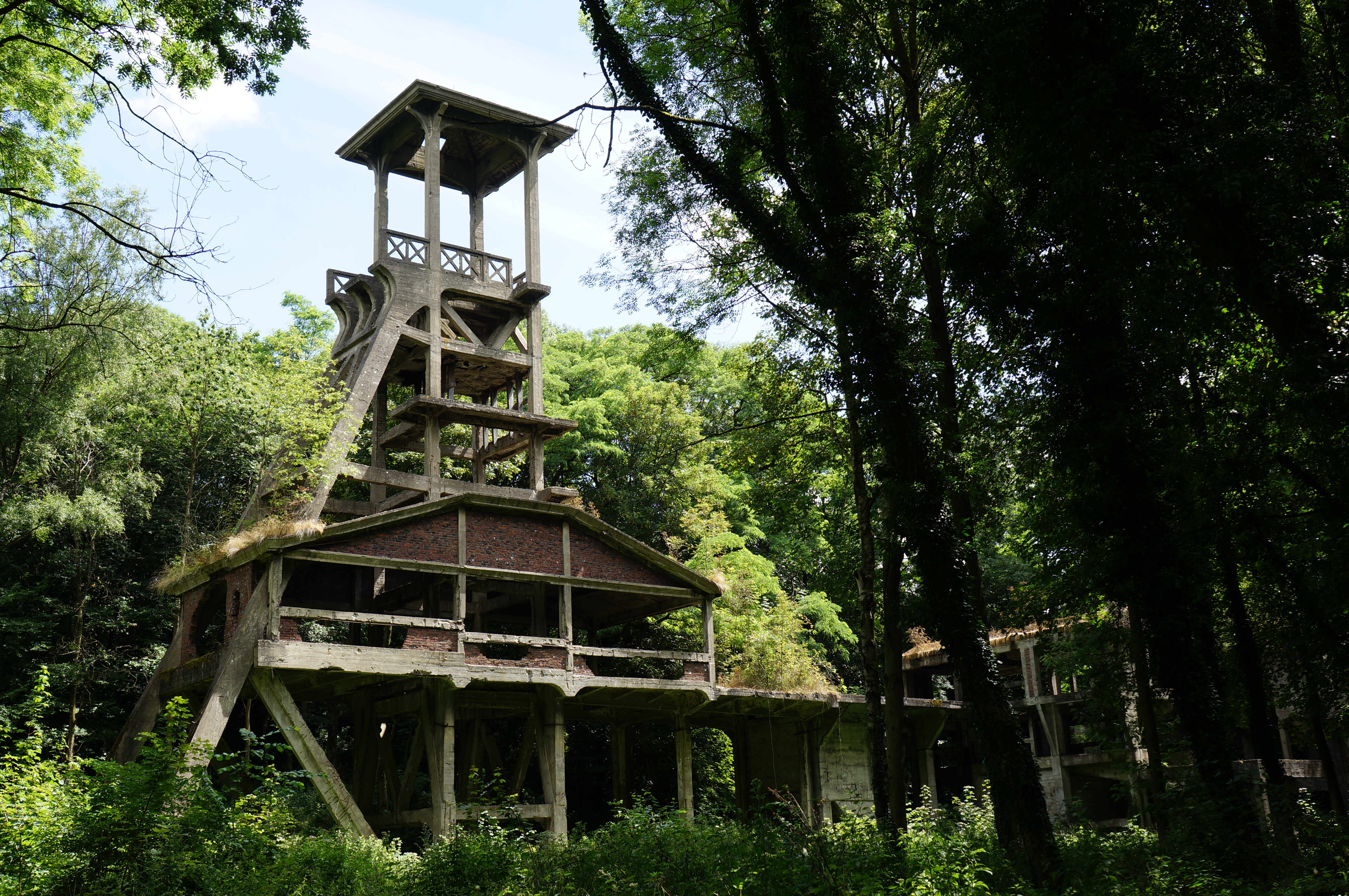 Charbonnage de Sauwartan: vue d'ensemble.